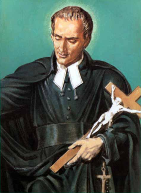 Luigi Maria Grignion de Montfort